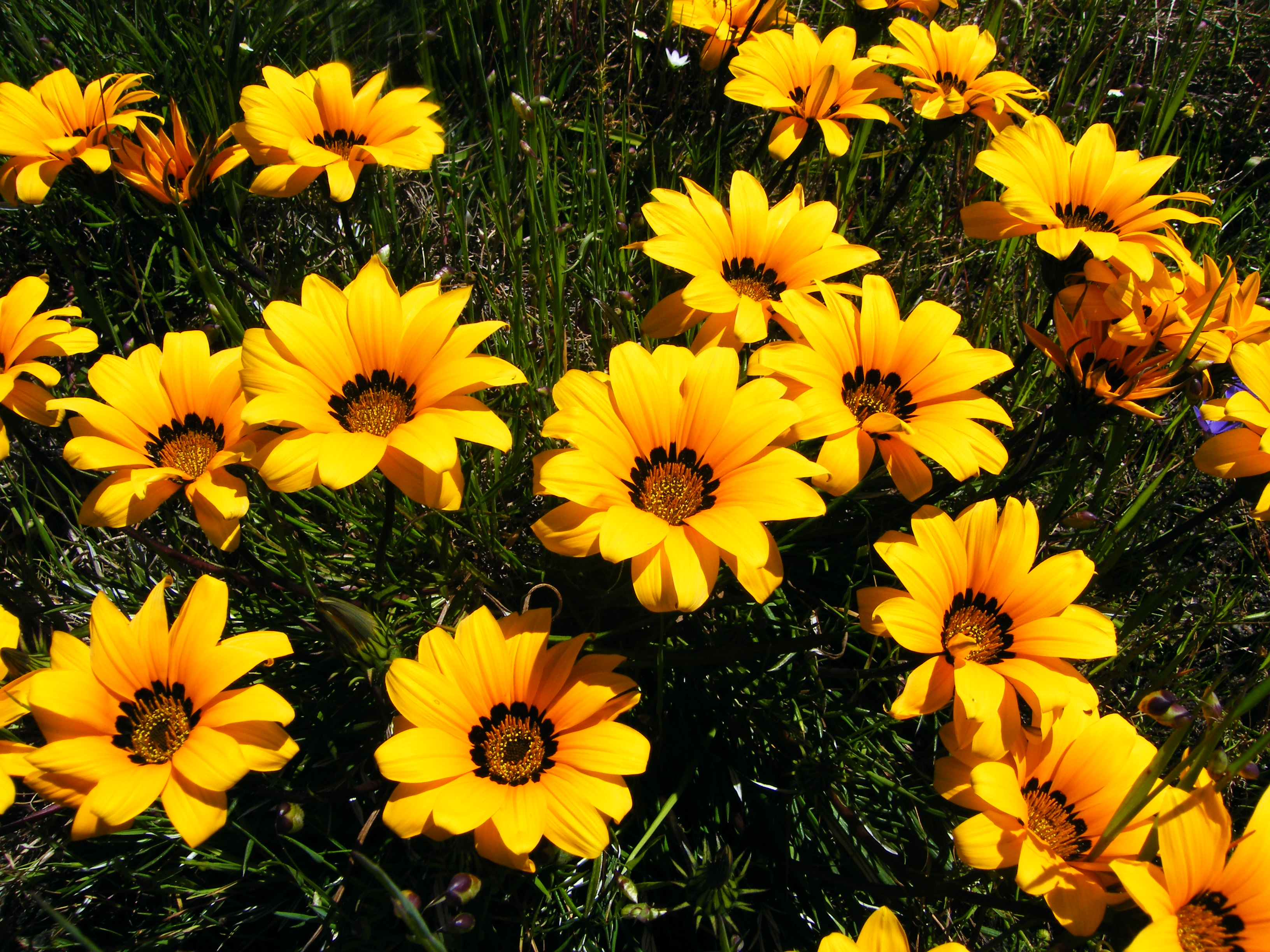 Botterblom